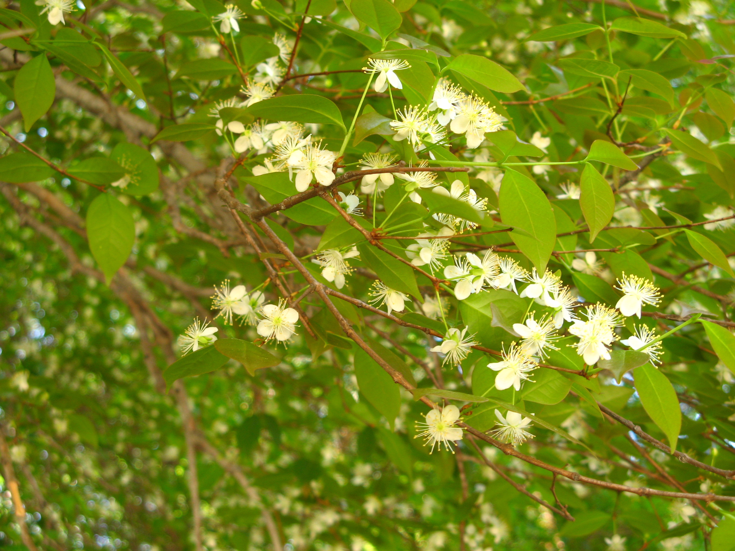 pintanga flowers sao paulo